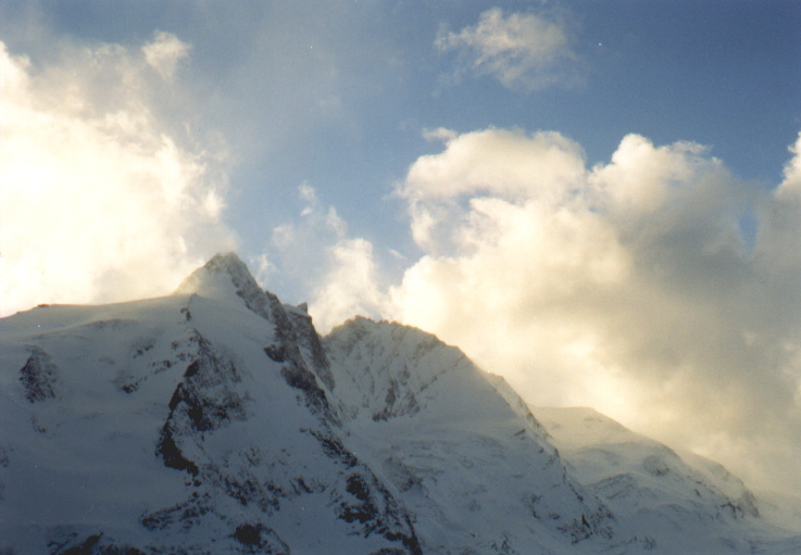 Der Großglockner von der Franz-Josefshöhe aus gesehen